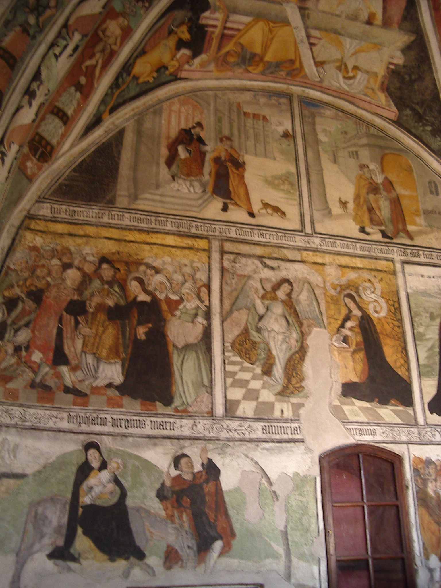 Scènes de vie de la Vierge, église paroissiale d'Elva, Cuni